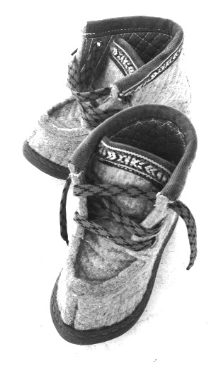 Lobber for barn, fottøy